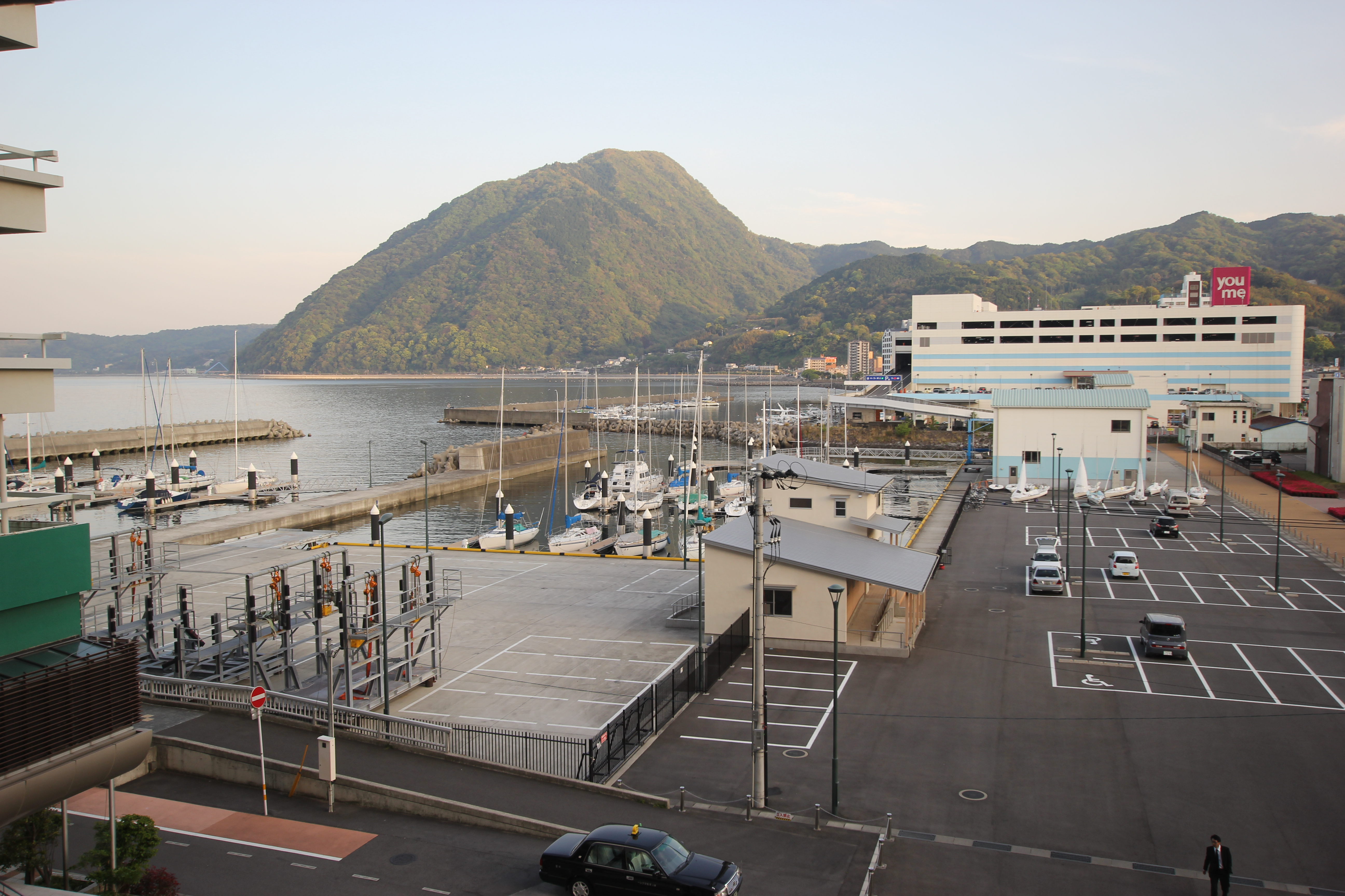 ゆめタウン別府と高崎山